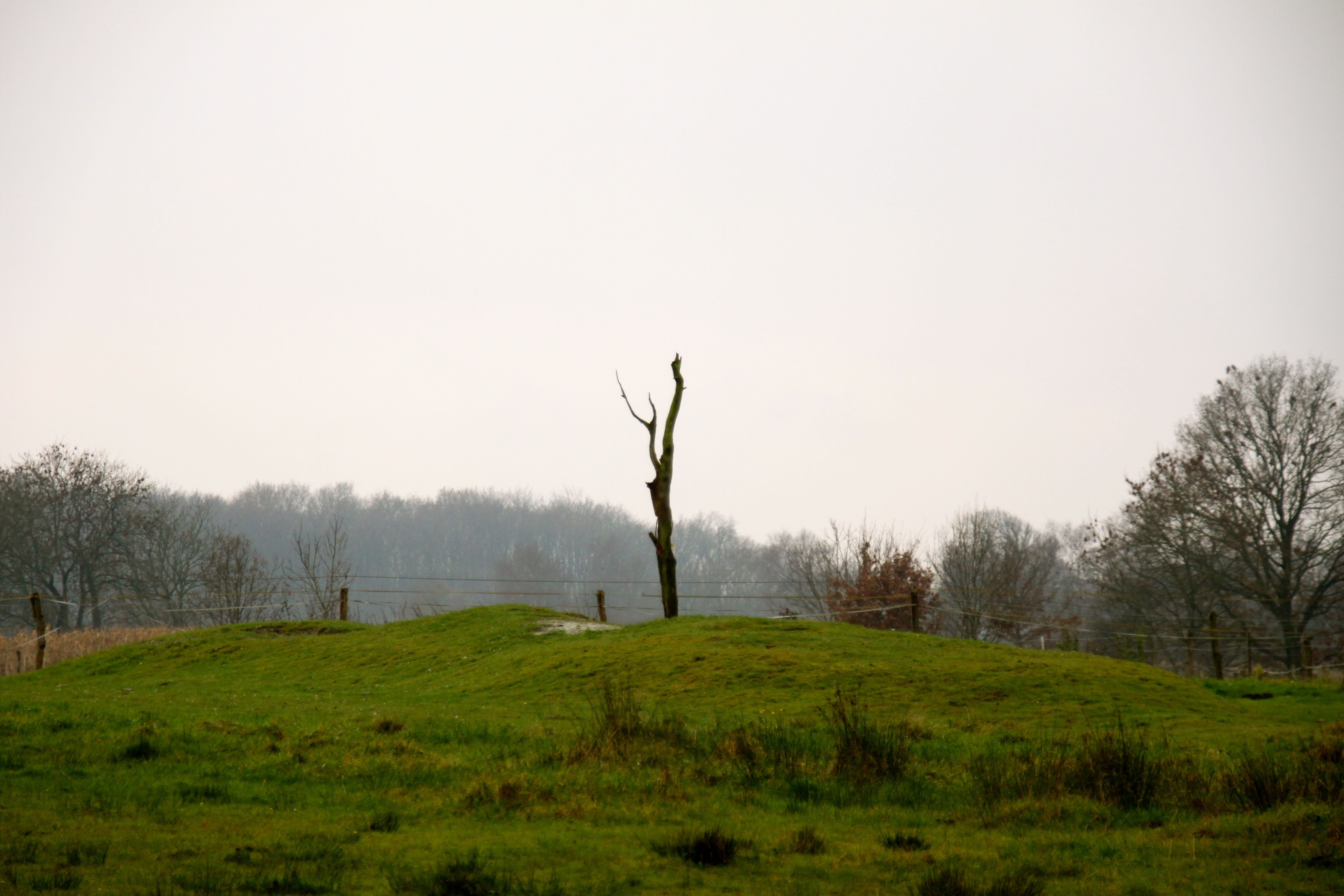 Wüstung des ehemaligen klosters Marienkamp